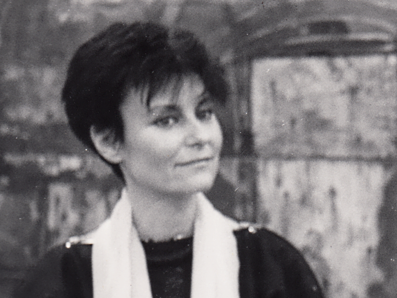 Vernissage Ausstellung Ingrid HartliebDepicted person: Ingrid Hartlieb